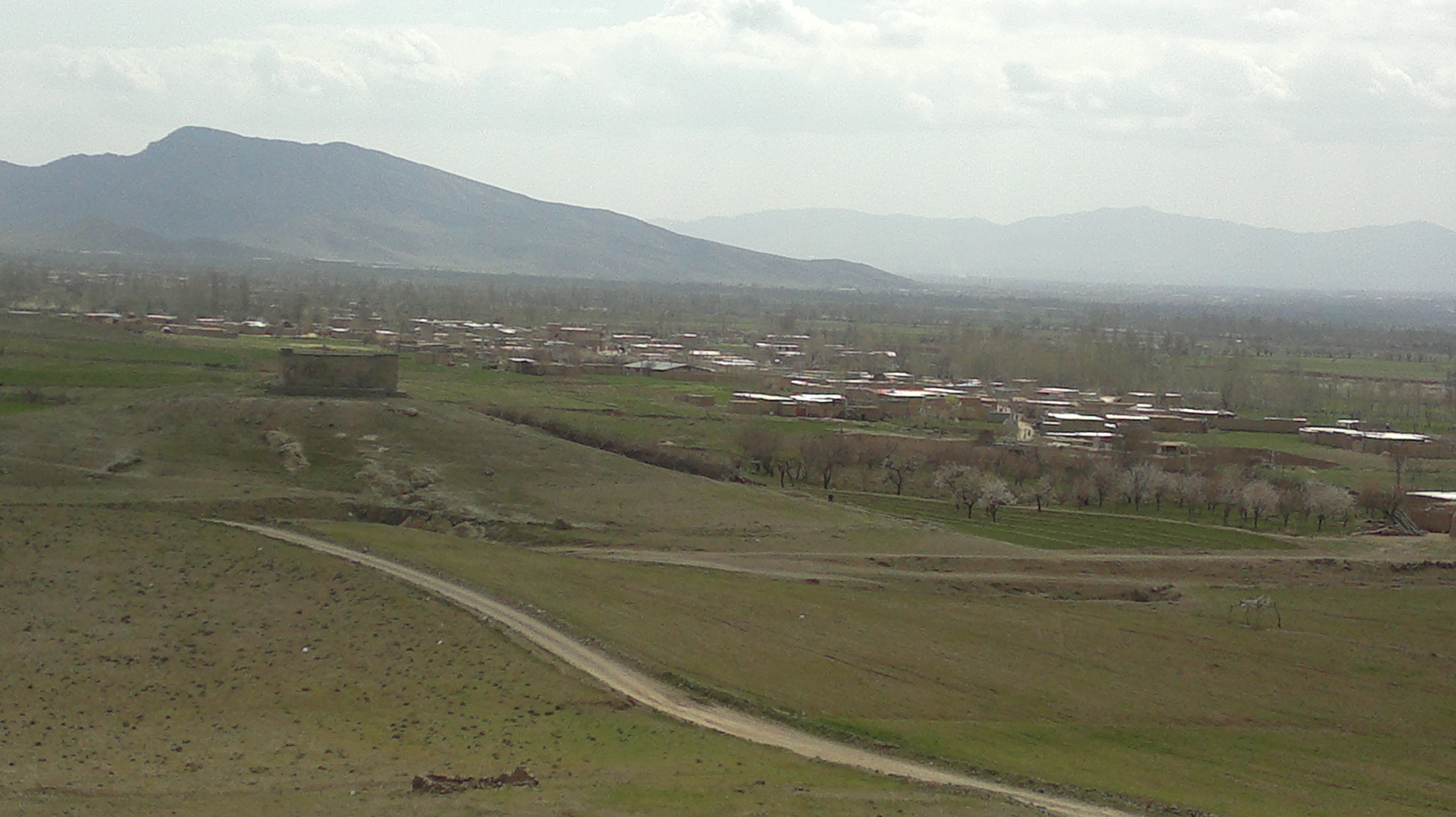 لیوار پایین محله توت آغاجی کاری از امیر رحیم زاده